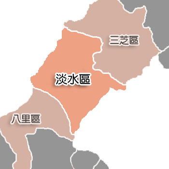 淡水區相對位置。